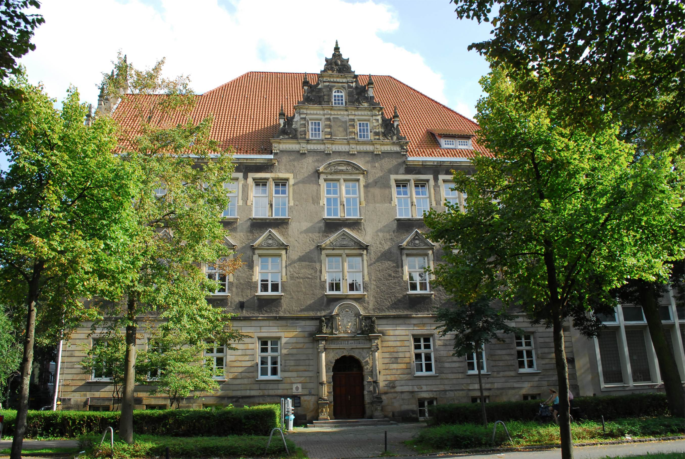 Realgymnasium am Barkhof in Bremen, Parkallee 39 / Am Barkhof.Das abgebildete Objekt ist ein geschütztes Kulturdenkmal in der Freien Hansestadt Bremen, mit der Nr. 0997 beim Landesamt für Denkmalpflege registriert.